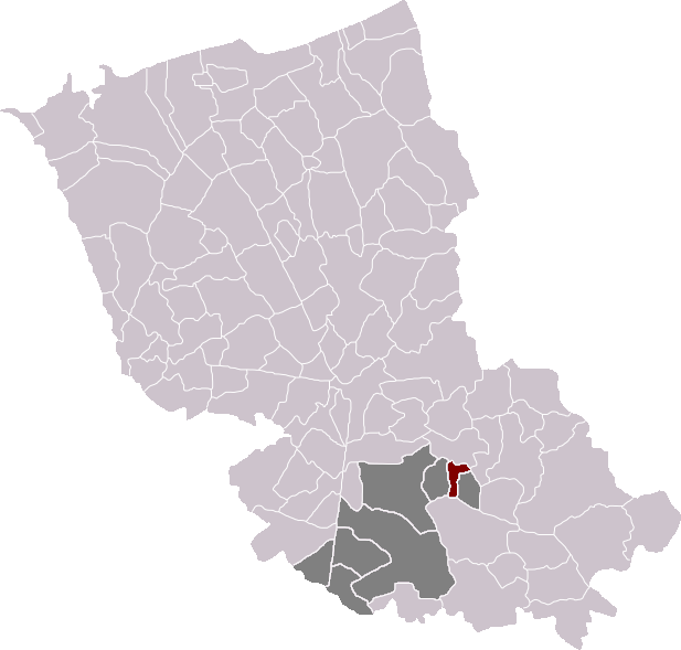 Carte de localisation de la commune de Pradelles (59) / Map of localisation of the municipality of Pradelles (59)